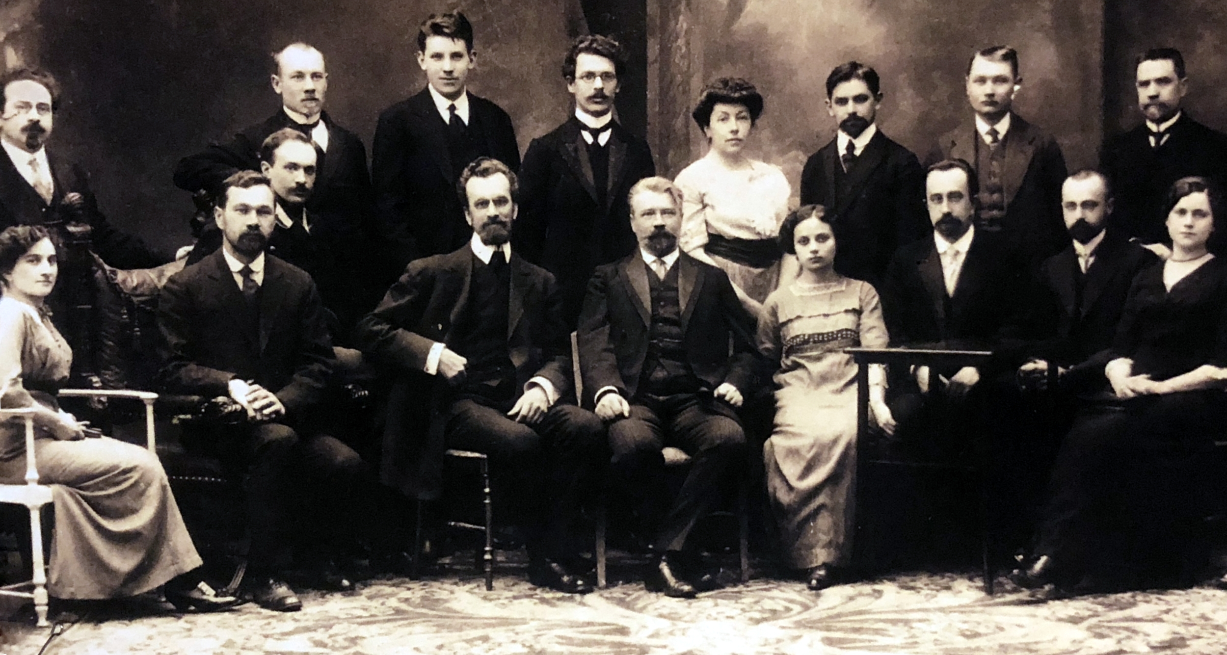 Докучаевский почвенный комитет, 1912-1913 год. Сидят: ?, Прасолов Л.И., Отоцкий П.В., Глинка К.Д., ?, Маляревский К.Ф., Неуструев С.С. 5 слева стоит Панков А.М.